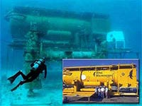 Labor Aquarius